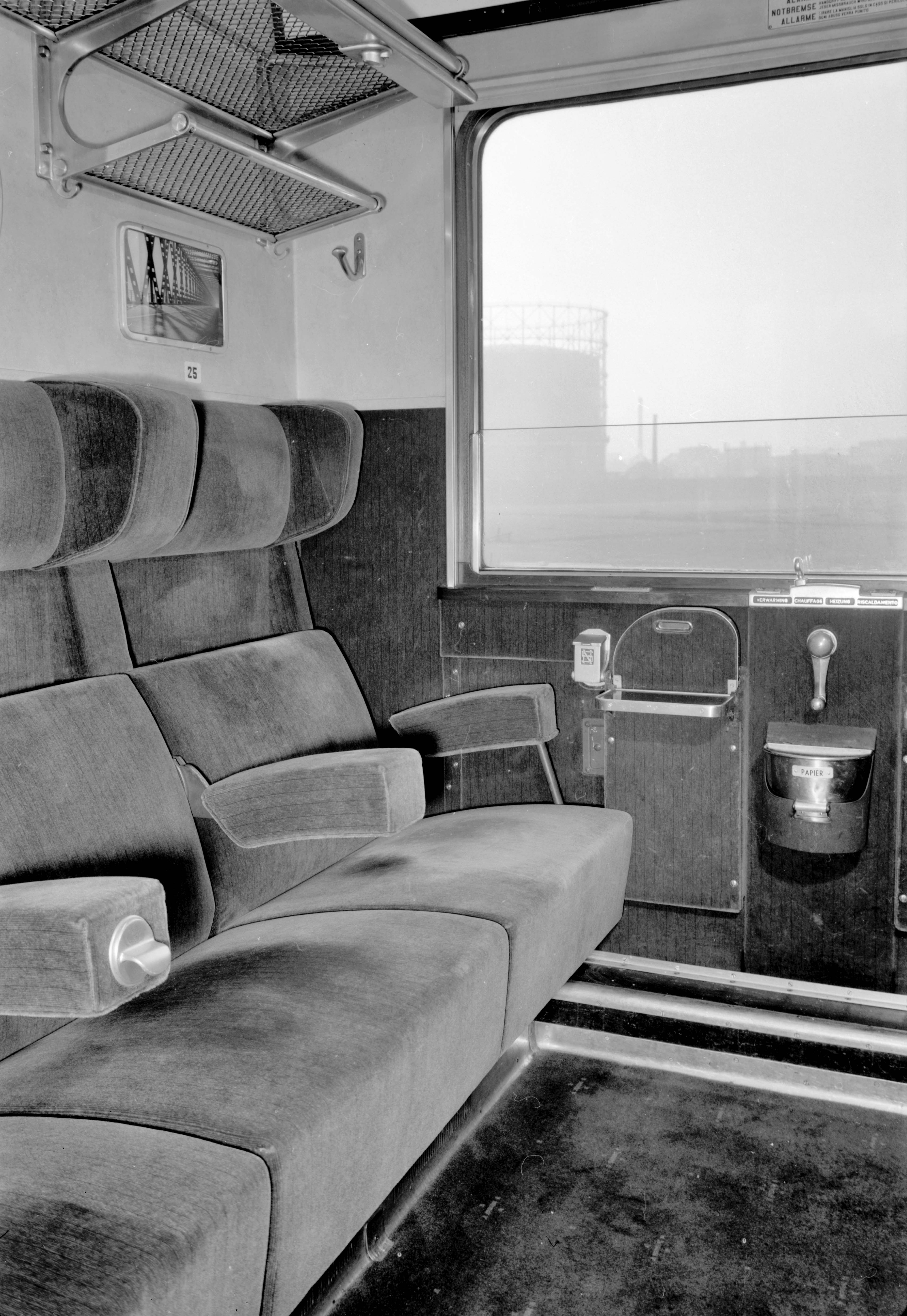 Interieur 1e klasse van het rijtuig nr. AB 7378 (plan K, serie AB 7351-7380) van de N.S. te Amsterdam.